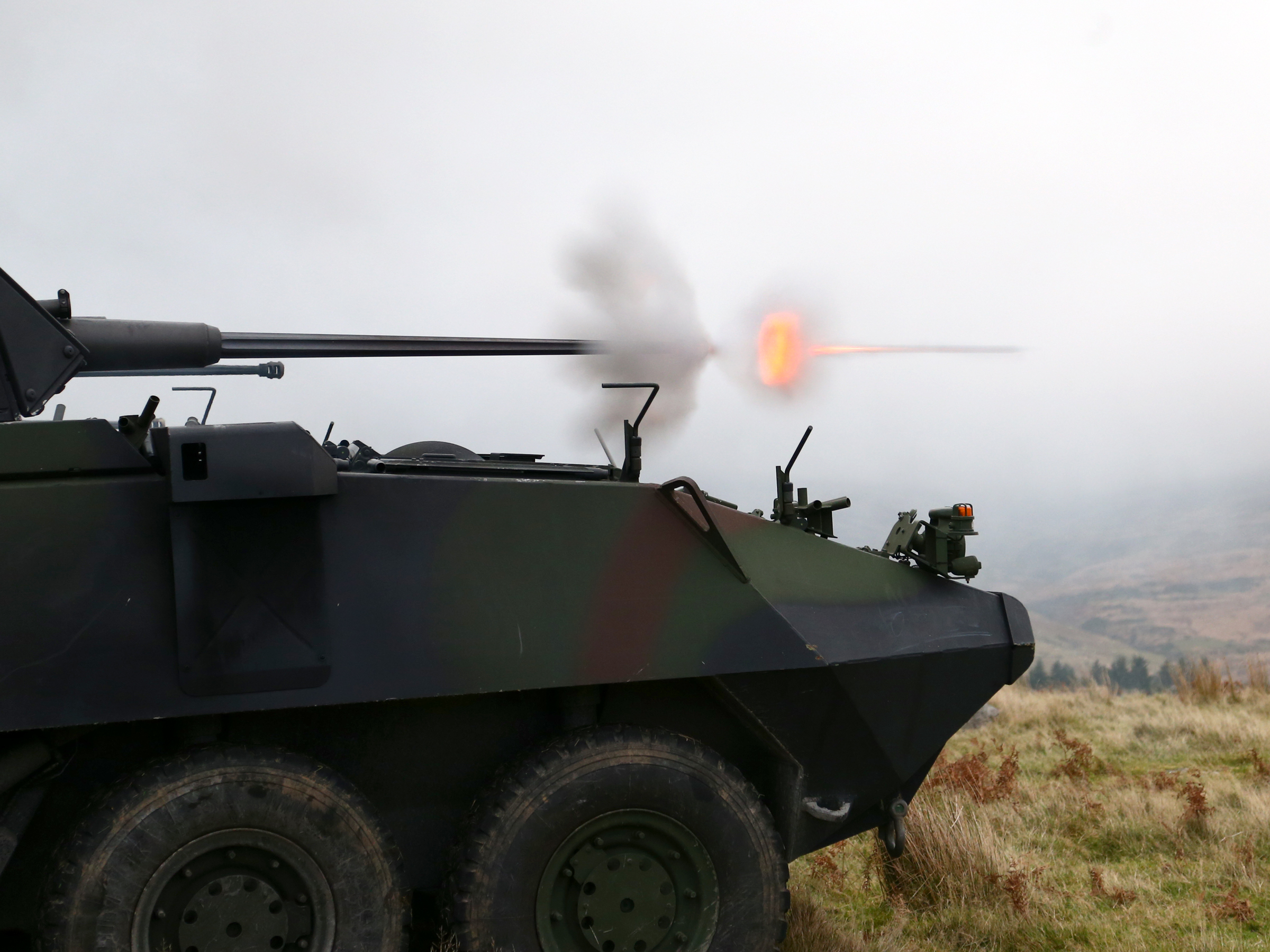 Cav Shoot Glen of Imaal